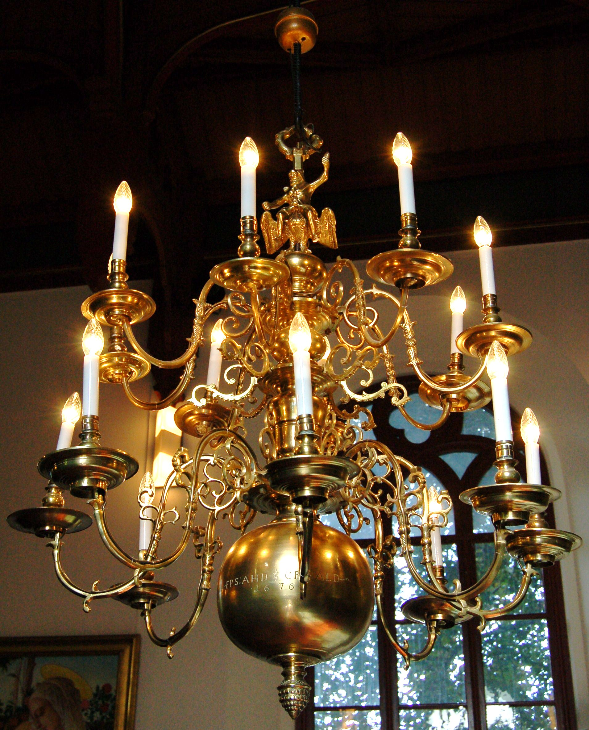 Lysekrone fra 1676 i Larvik kirke FPS:AHD CBS:ALD